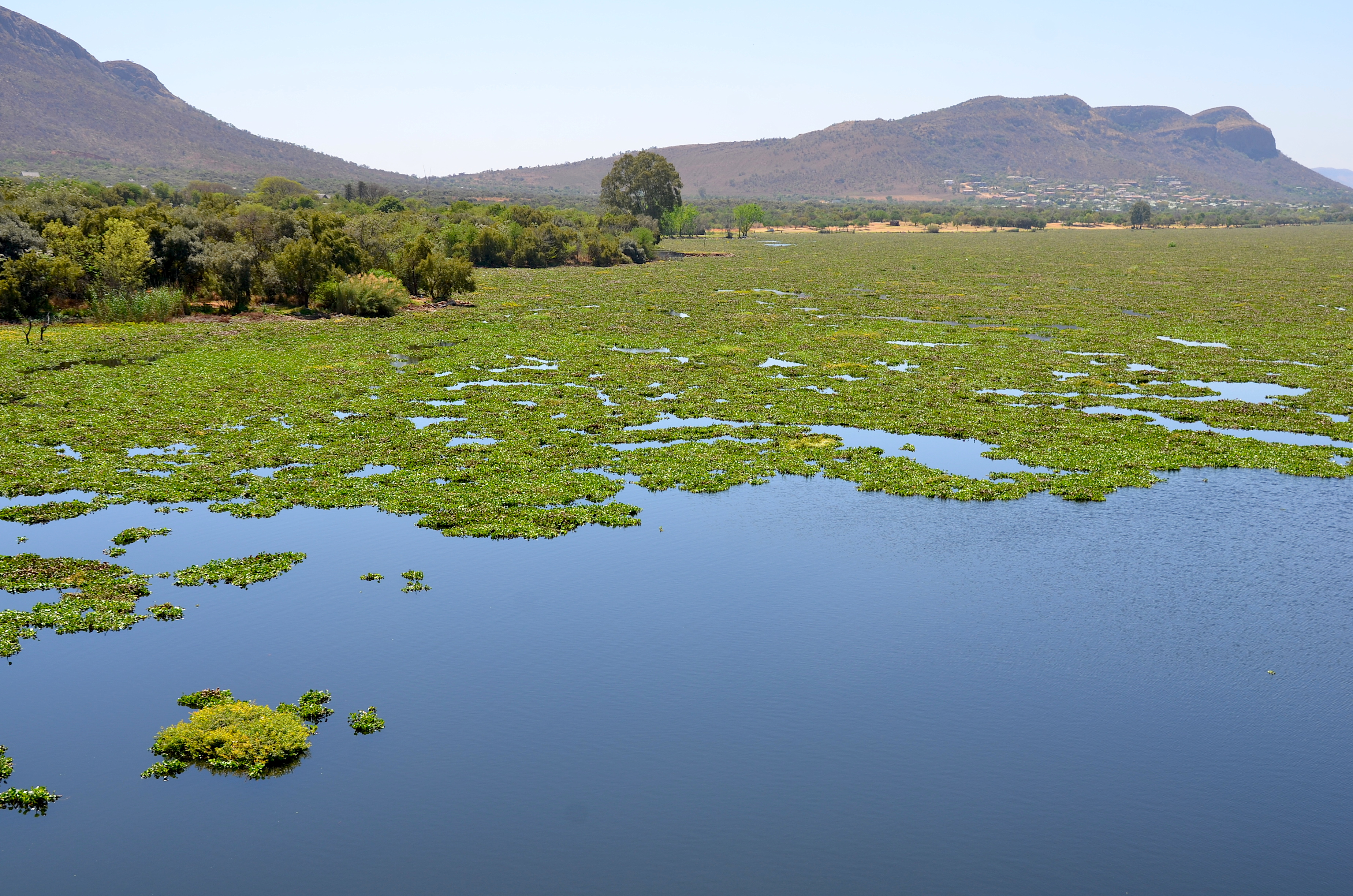 Wasserhyazinthen besiedeln den Hartbeespoort-Stausee in der Provinz Nordwest (Südafrika)